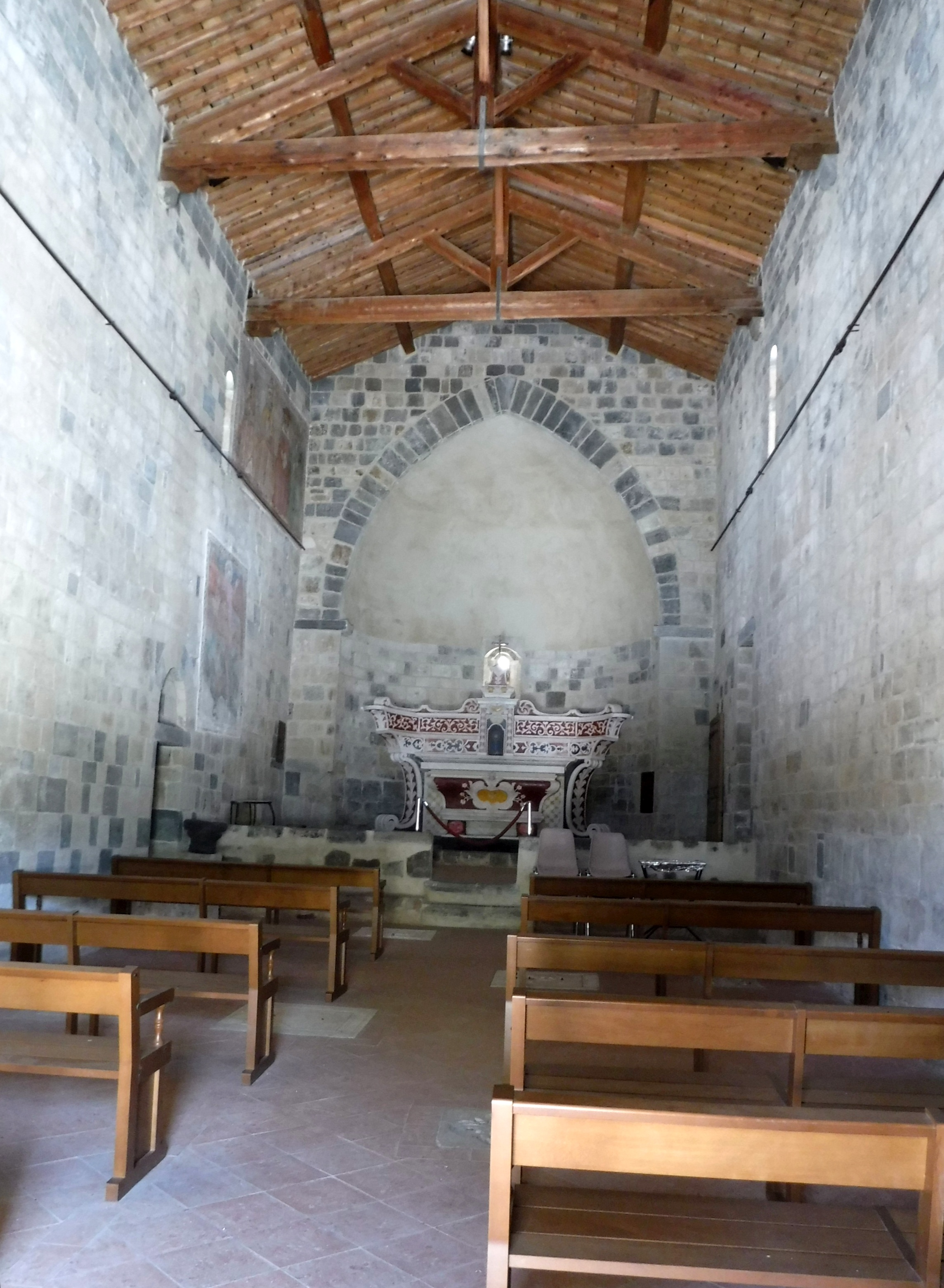 Die romanisch-pisanische Église de la Trinité et de San Giovanni (franz.: Église de la Sainte-Trinité et de Saint Jean-Baptiste) befindet sich auf dem Friedhof von Aregno im Nordwesten der Insel Korsika.